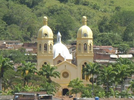 Vista de la fachada de la iglesia de Gramalote, Norte de Santander, Colombia.